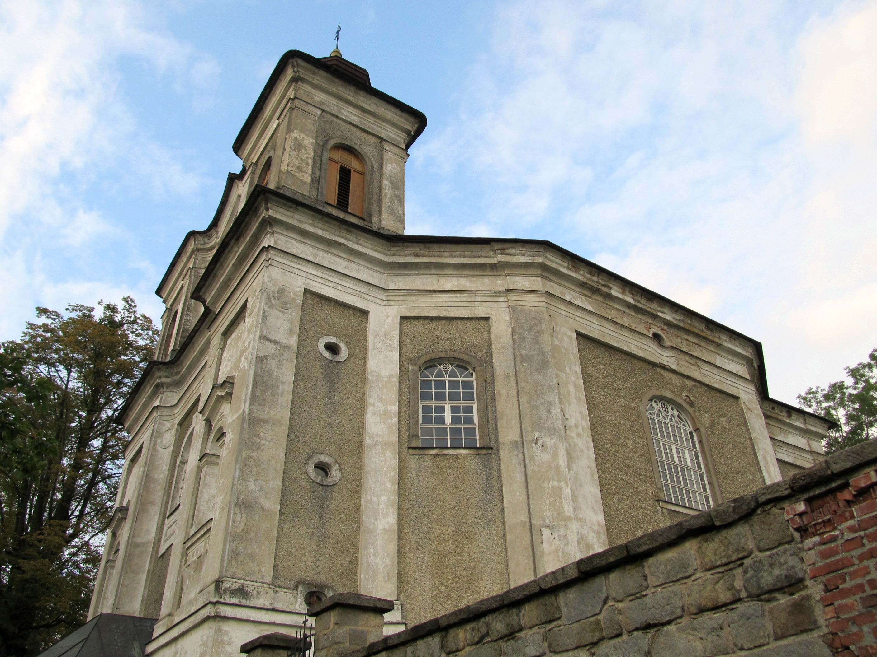 Kostel svatého Prokopa (Bezděkov nad Metují), Bezděkov nad Metují